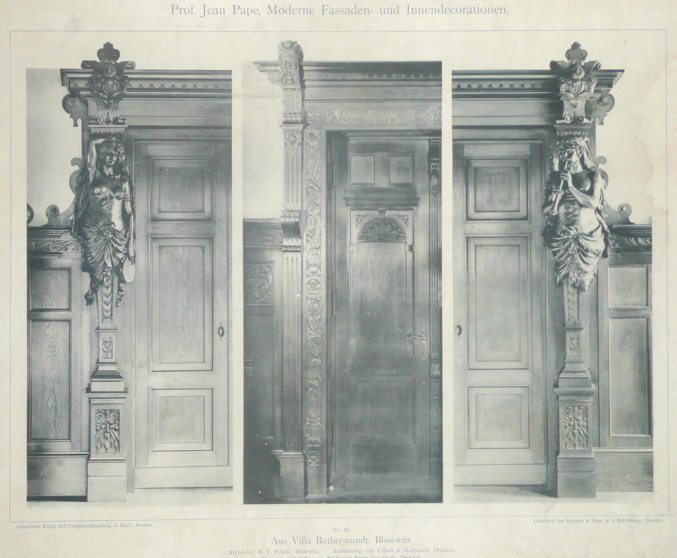 Dresden: Villa Rothermundt, verzierte Innentüren nach Vorlage des Dresdner Bildhauers Eduard Jungbluth